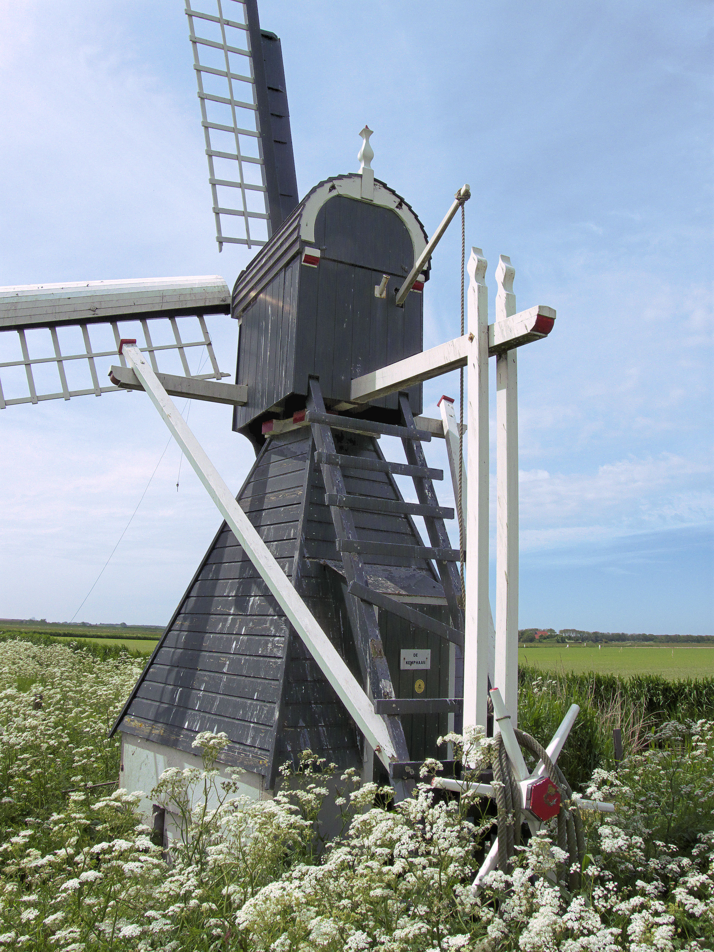 Molen De Kemphaan, Texel, staartzijde